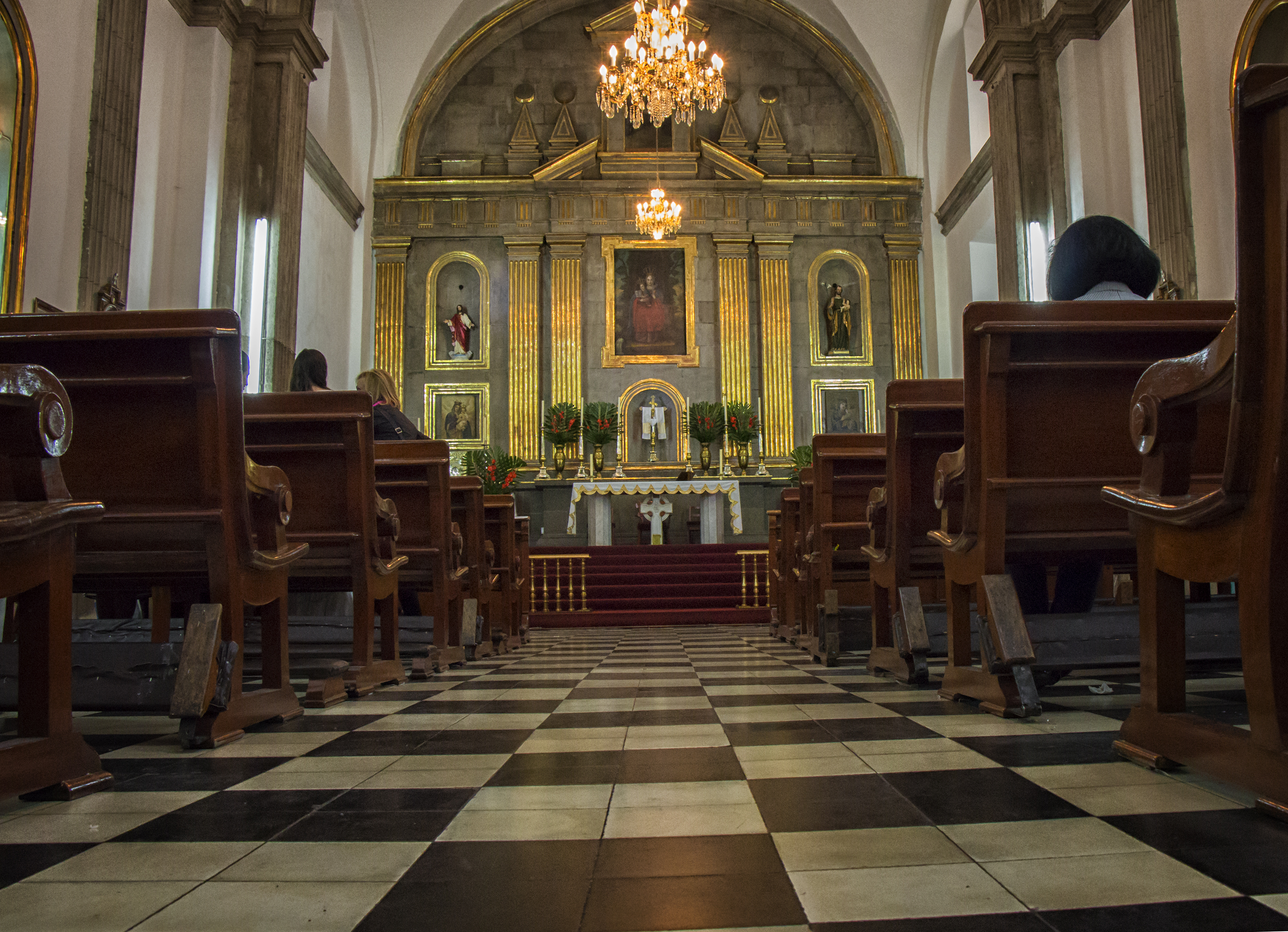 Templo de Nuestra Señora de Balvanera